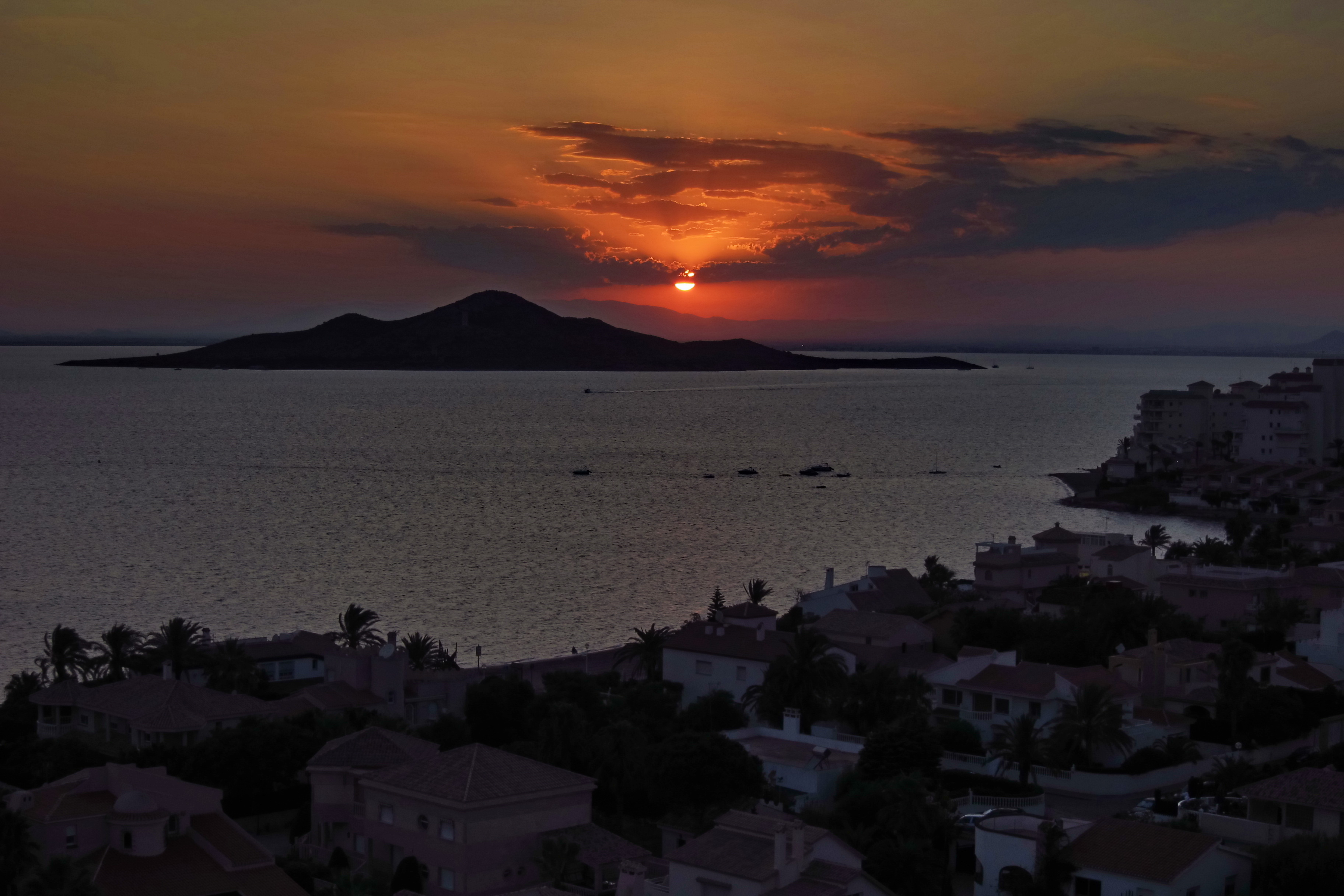 Isla del Barón (Isla Mayor) - Mar Menor - Cartagena, Murcia - España